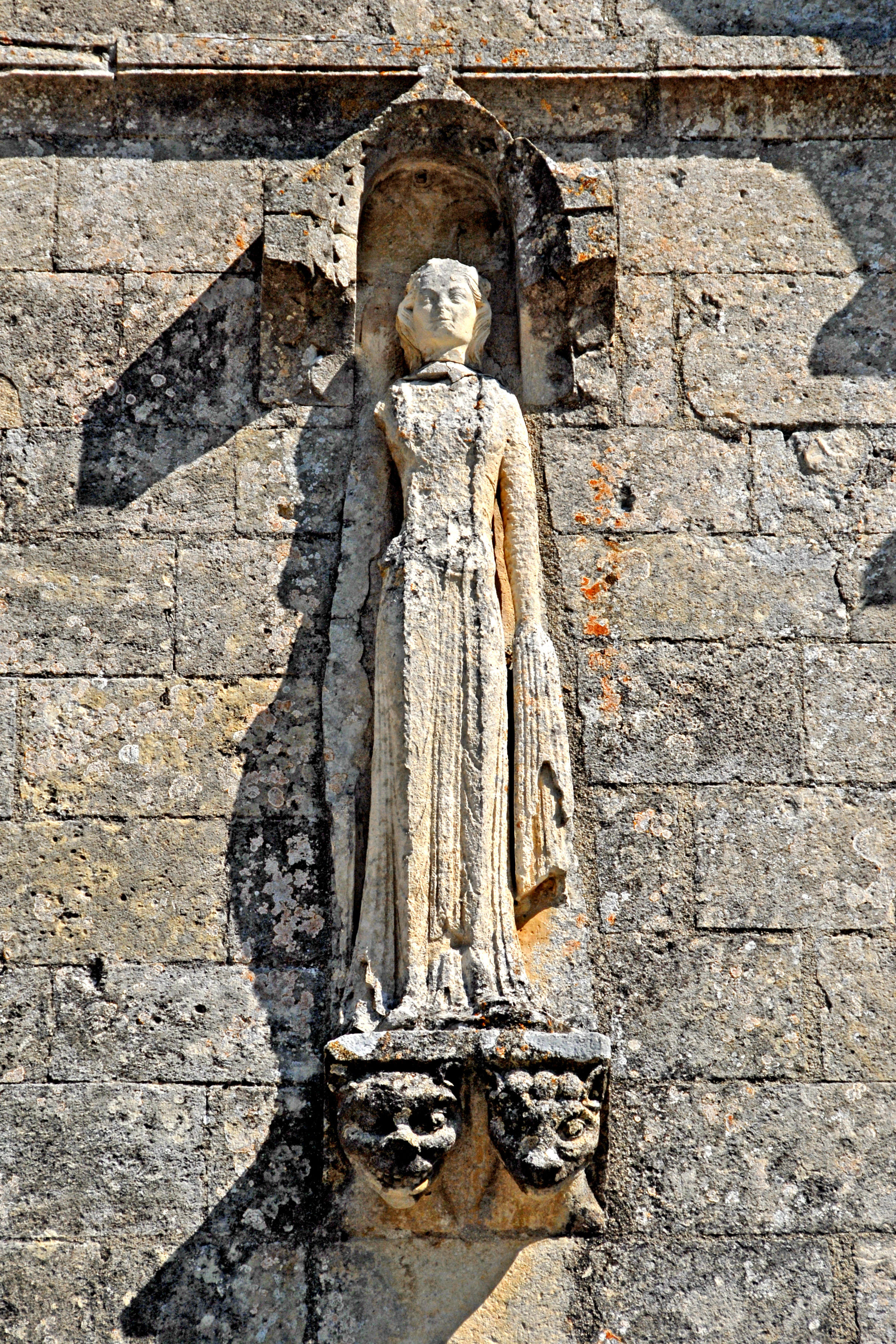 Ste.-Hérie, Monumentalstatue, rechtes Feld Obergeschoss